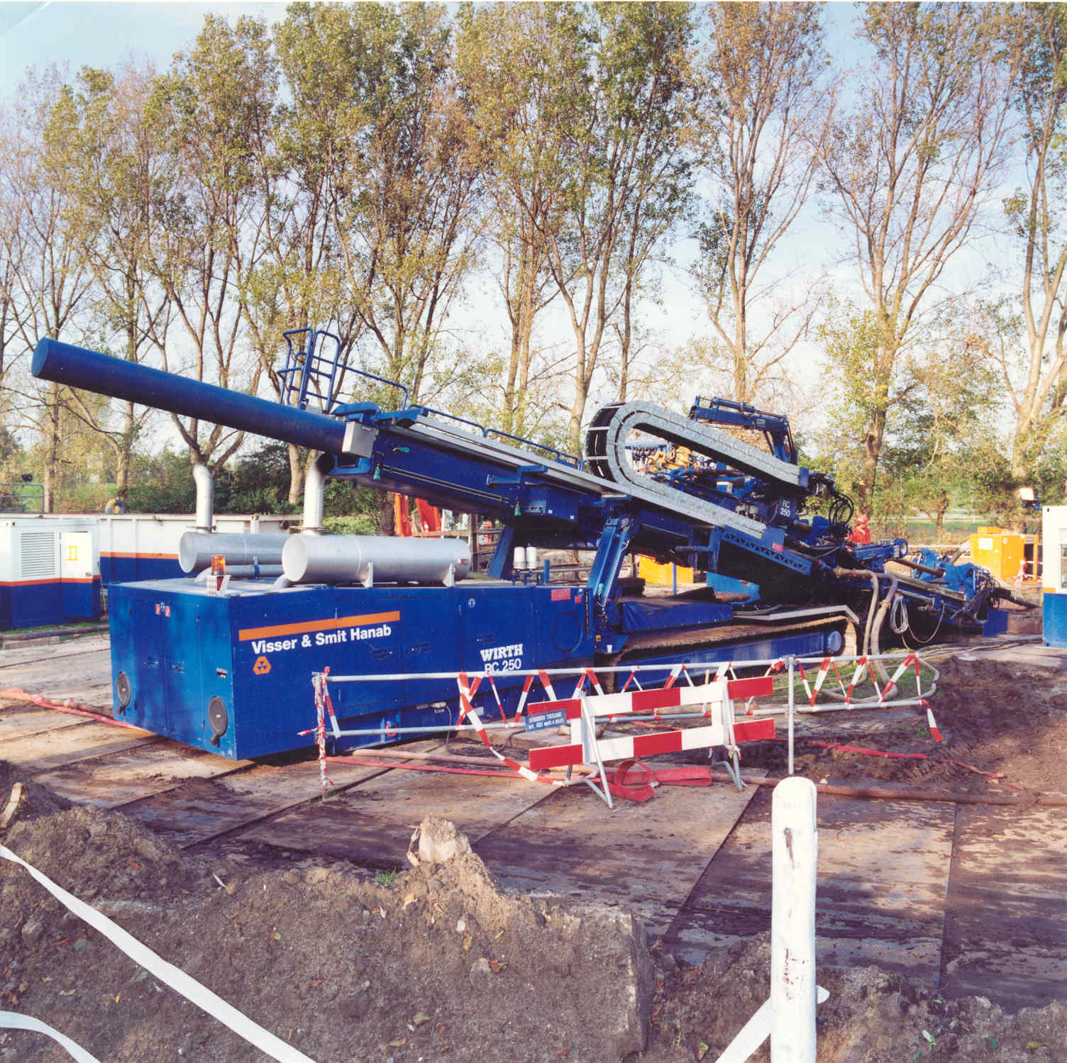 een rig voor HDD-boring. auteur: TU Delft, Faculteit Civiele Techniek en Geowetenschappen, Leerstoel Ondergronds Bouwen